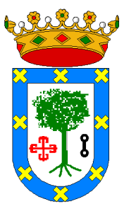 Escudo de Moral de Calatrava